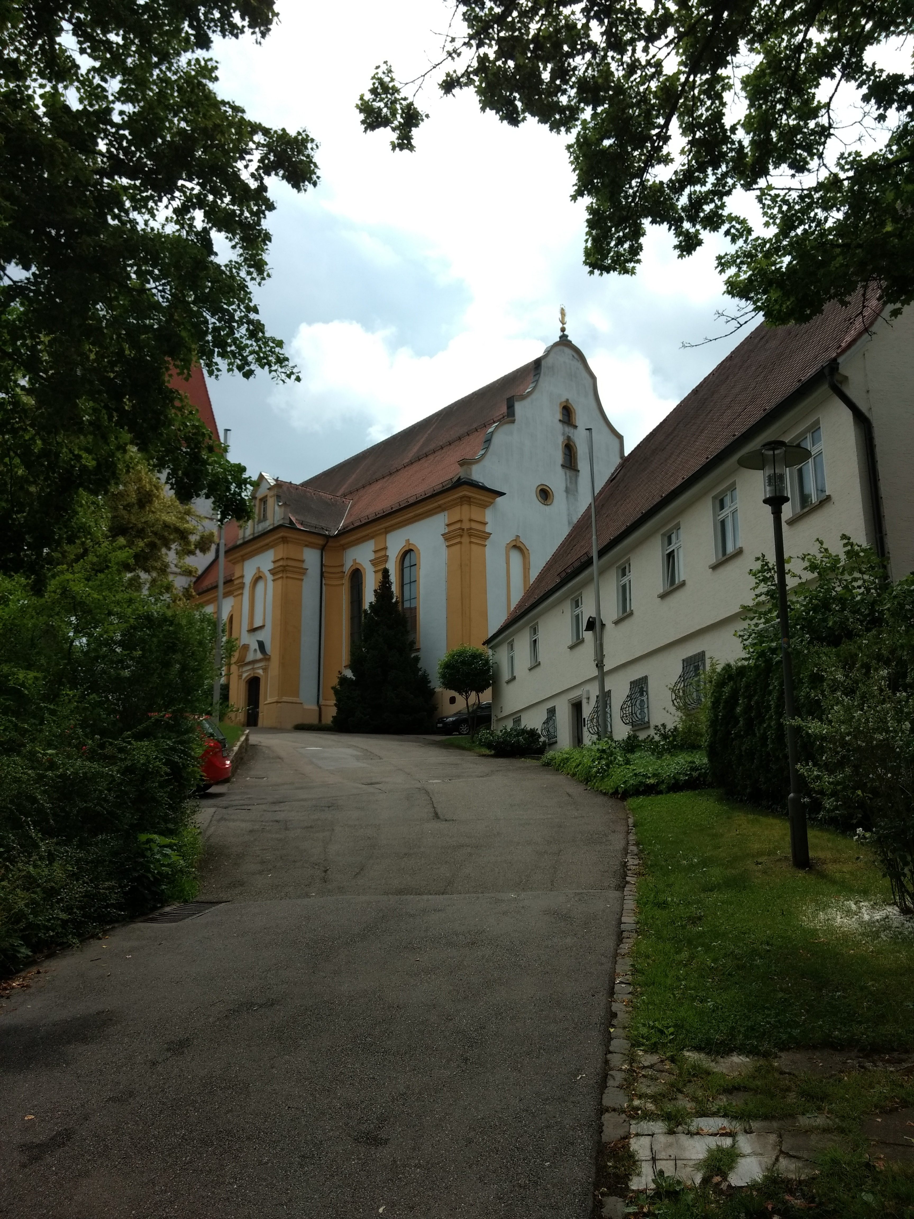 Wallfahrtskirche Unterkochen